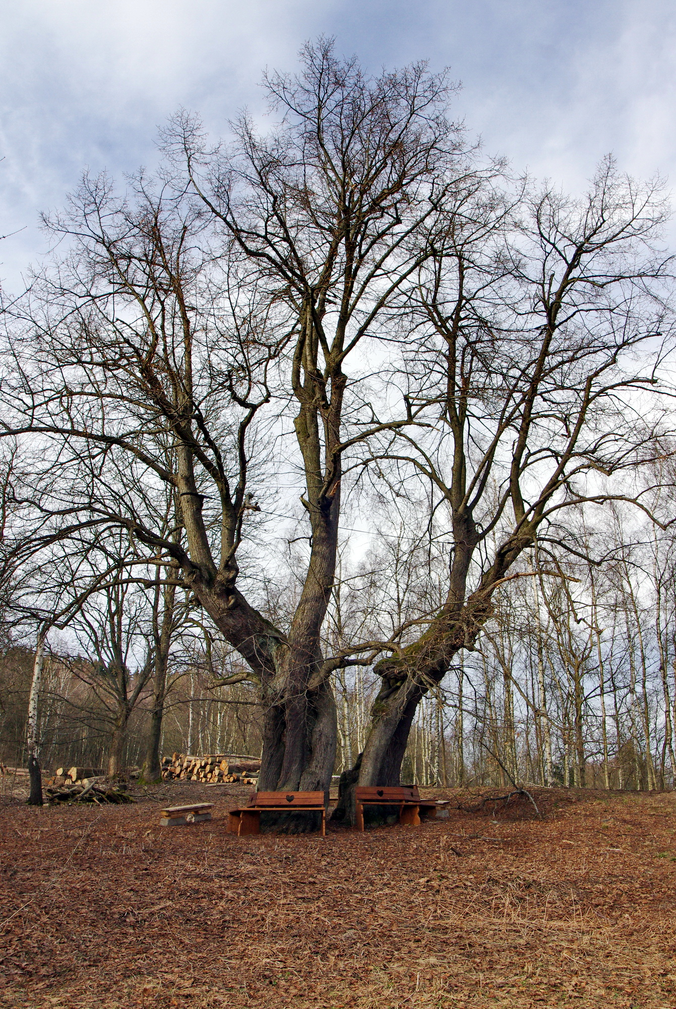 Památný strom Dolní Popovská lípa, okres Karlovy Vary